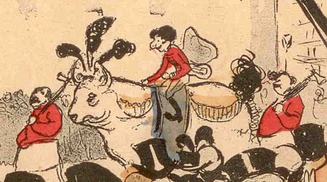 Le Bœuf Gras du Carnaval de Paris défile.